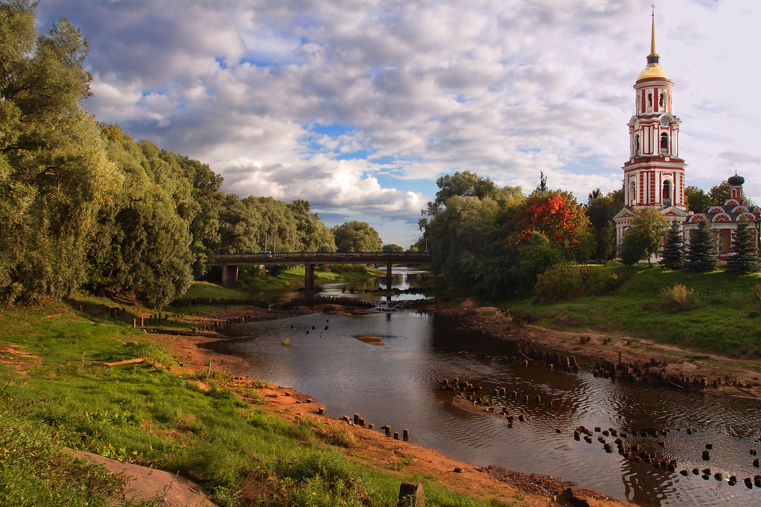 Колокольня: улица Возрождения, 1, Старая Русса, Новгородская область